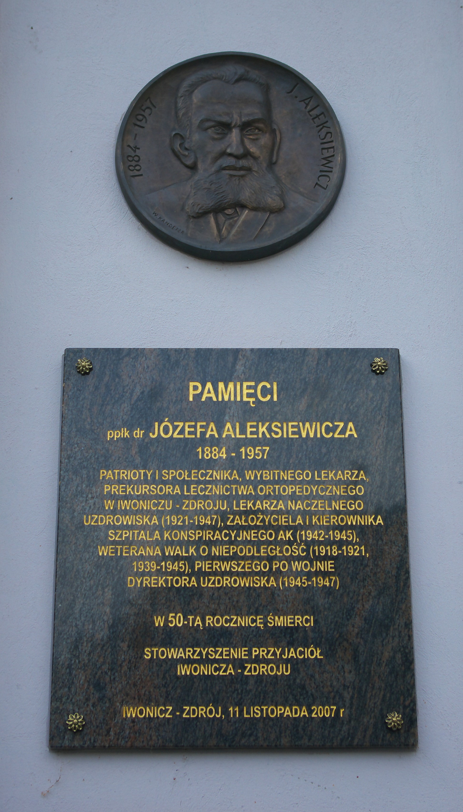 Upamiętnienie Józefa Aleksiewicza na budynku Starych Łazienek w Iwoniczu-Zdroju